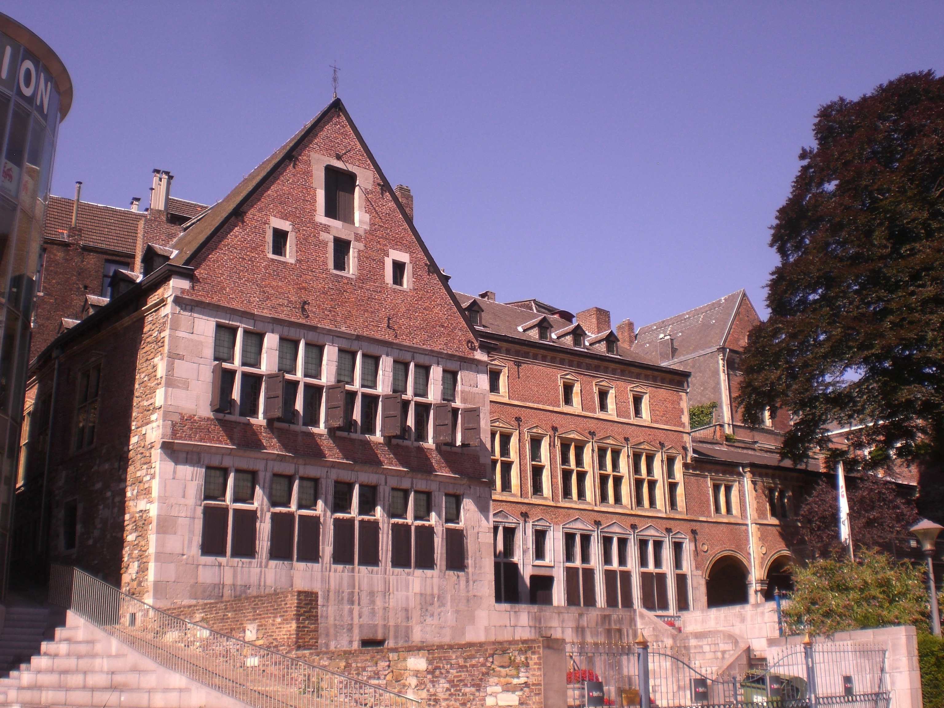 Hôtel de Bocholtz, Liège